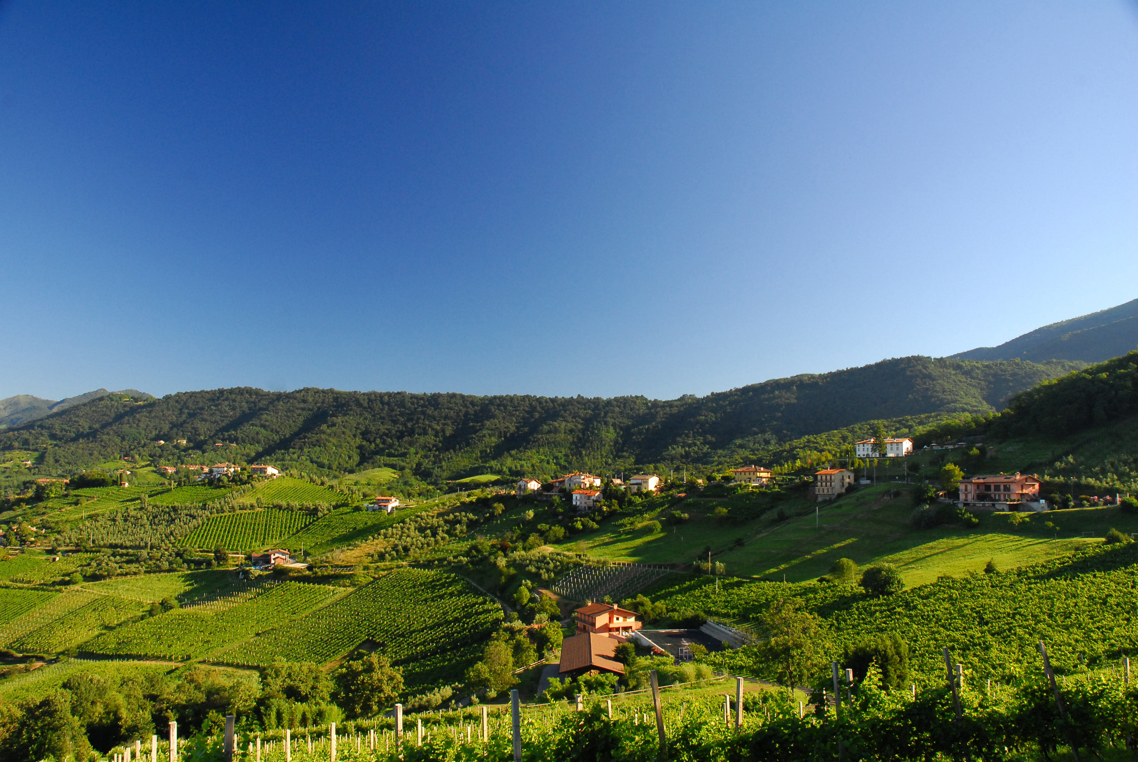 Vista delle splendite colline dove nasce il Moscato di Scanzo